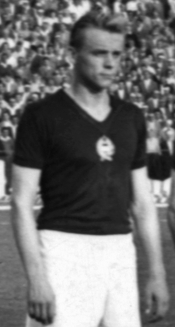 Solymosi Ernő olimpiai és Európa-bajnoki bronzérmes magyar labdarúgó.